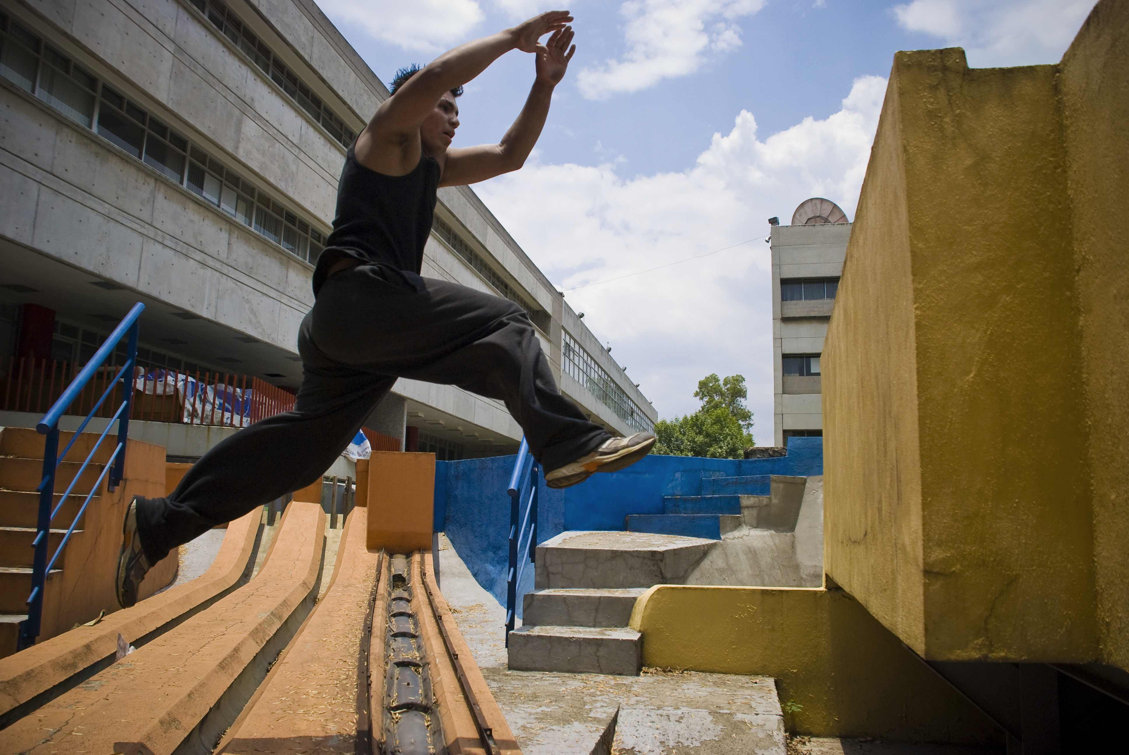 Gato, traceur de Urban Runners, ejecuta un Pasa Murallas durante el entrenamiento dominical de Parkour en CU.